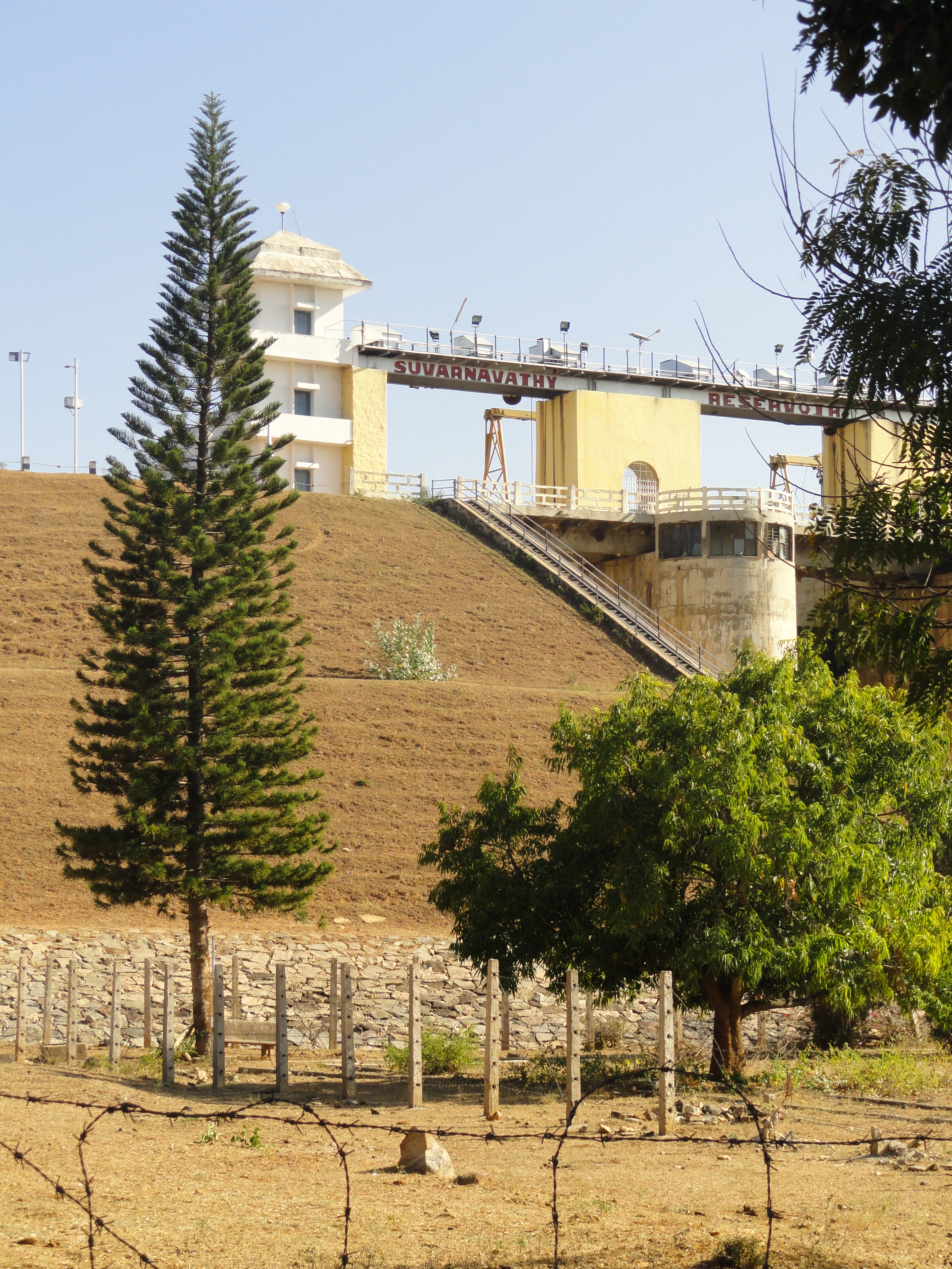 suvarnavathy reservoir